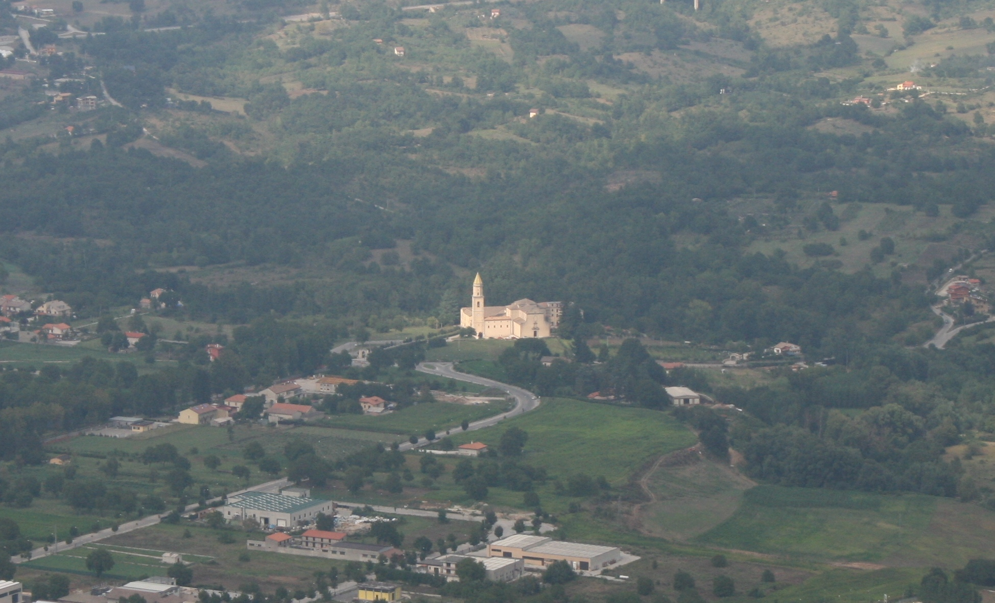 La Piana di Foloni a Montella (AV) con il Convento di San Francesco